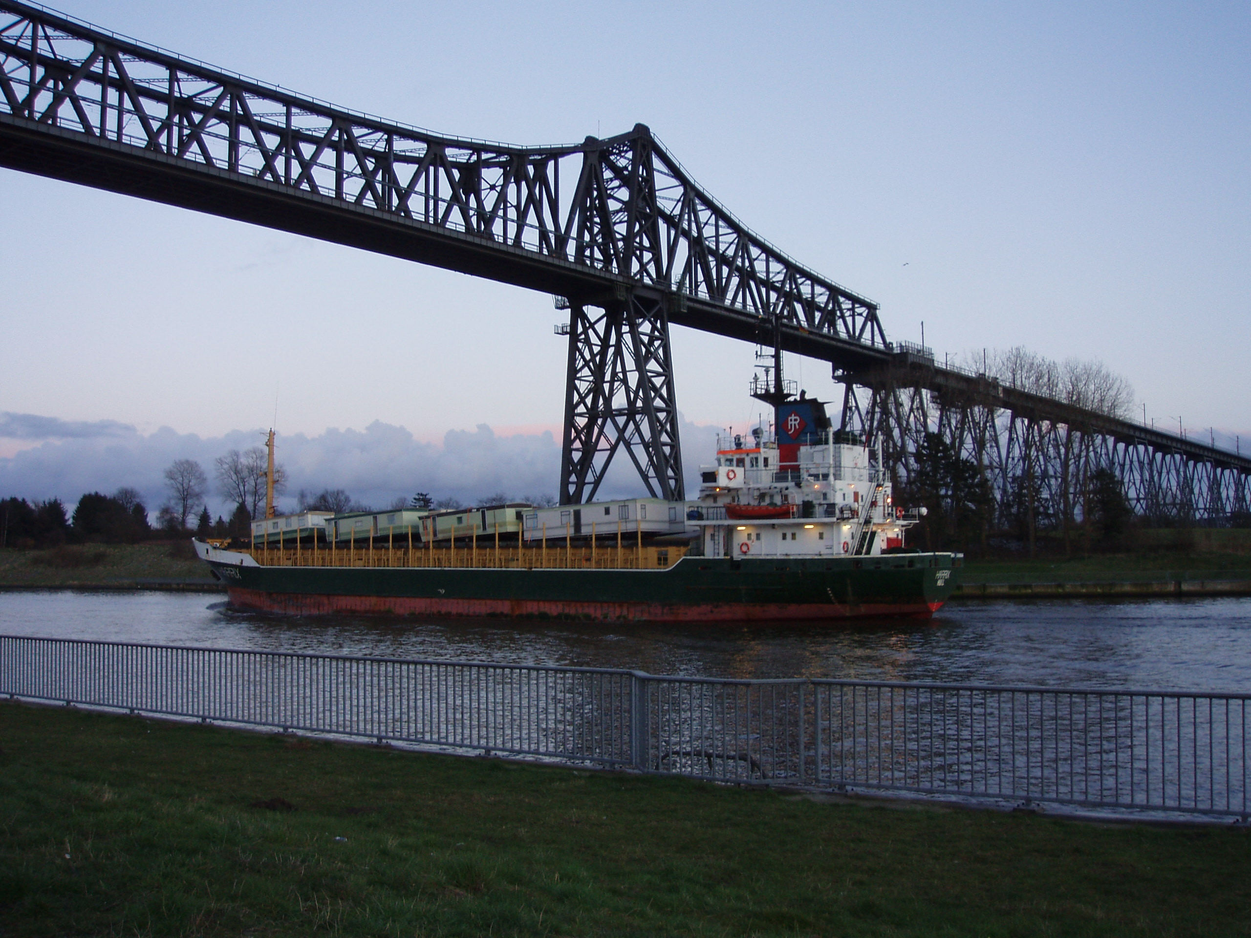 Schiff Harrix unter der Rendsburger Hochbrücke